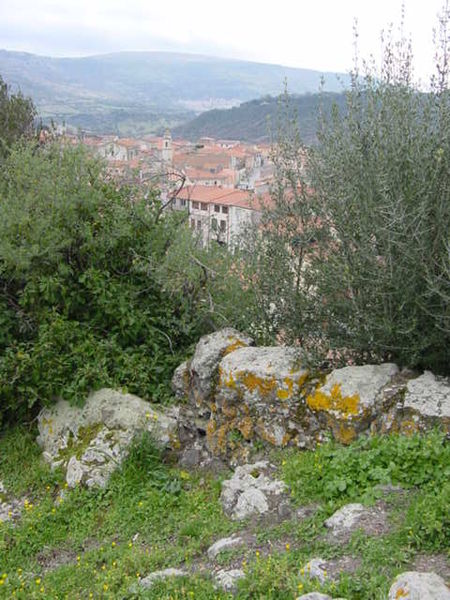 Siligo visto dai resti de su Runaghe.